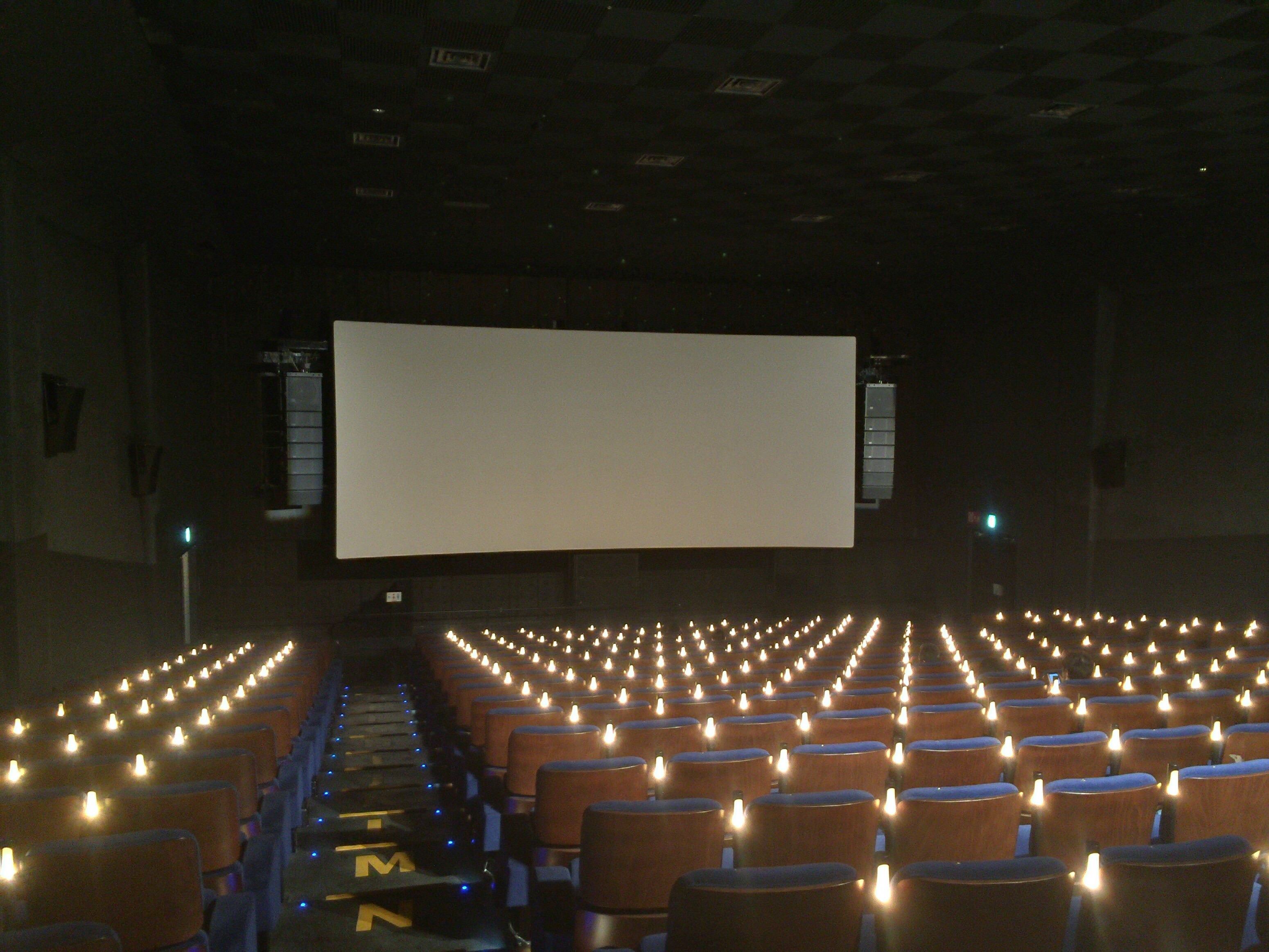 立川シネマシティ シネマ・ツー aスタジオ